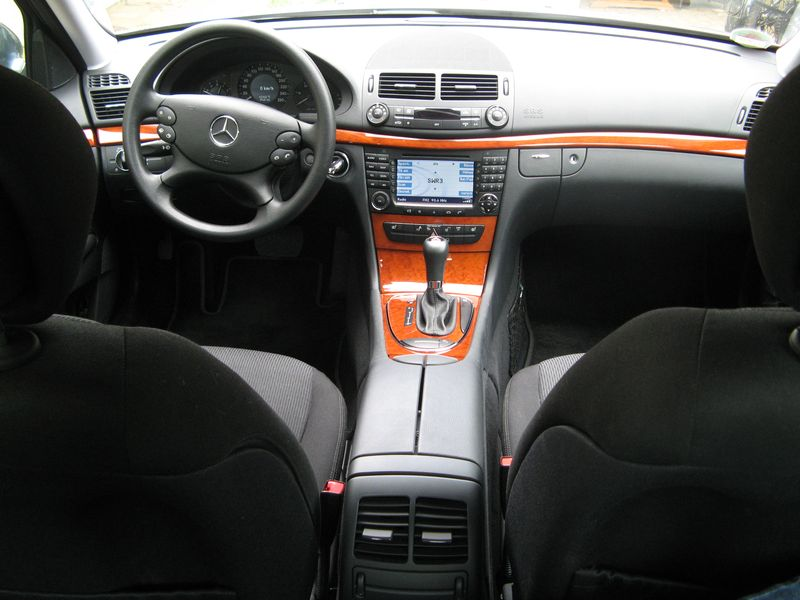 Mercedes E-Klasse (W211) Innenansicht